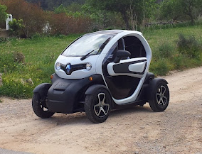 Renault Twizy, mit optionalen Scherentüren.